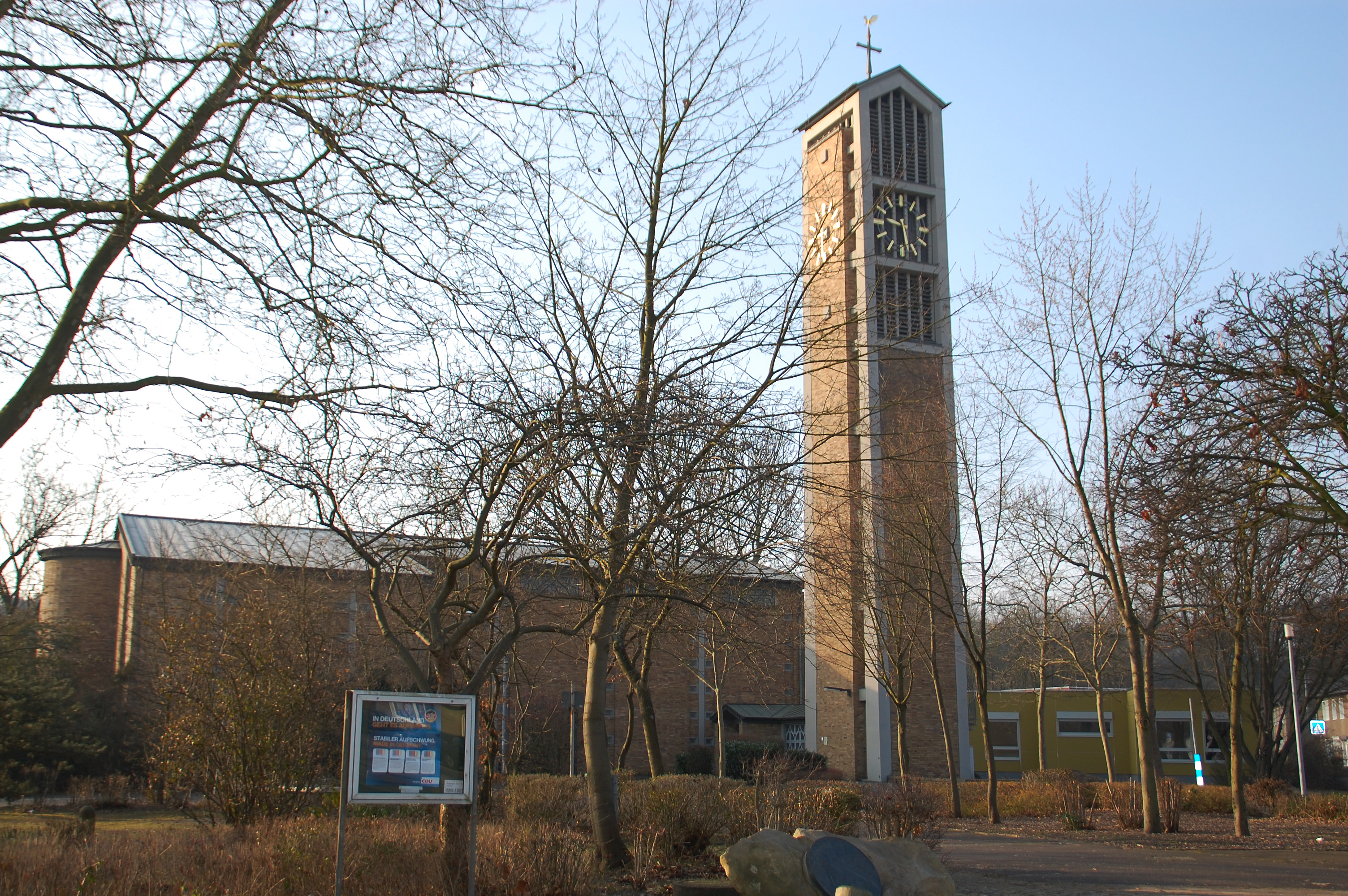 St. Wendelinus in Hürth-Berrenrath, Germany